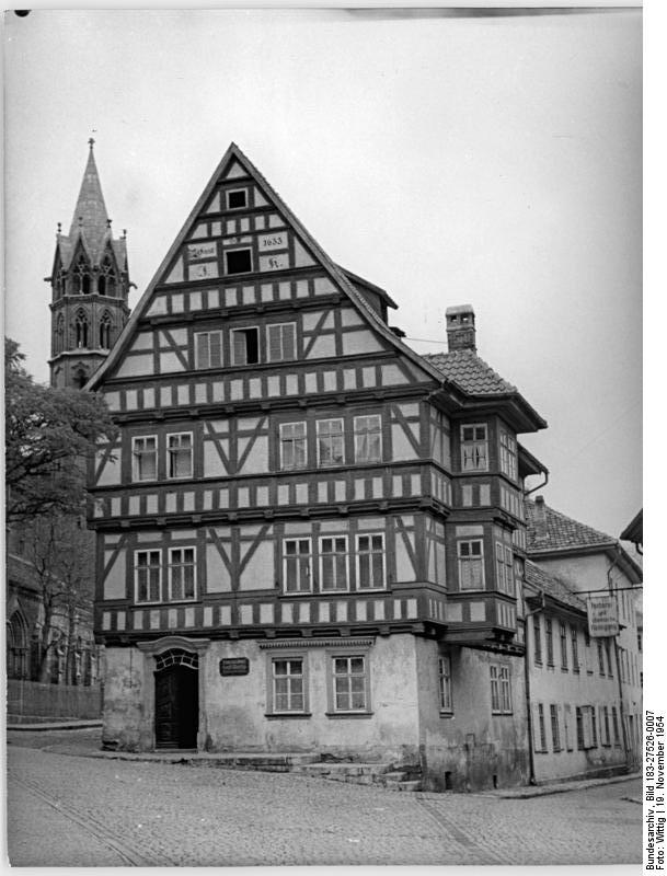 Zentralbild-TBD-Wittig 19.11.1954 Das 1250jährige Arnstadt - Die 1633 erbaute alte Papiermühle (Fachwerkbau) mit dem gotischen Gesellenturm der Liebfrauenkirche.